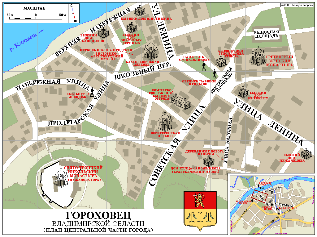 Собственная работа